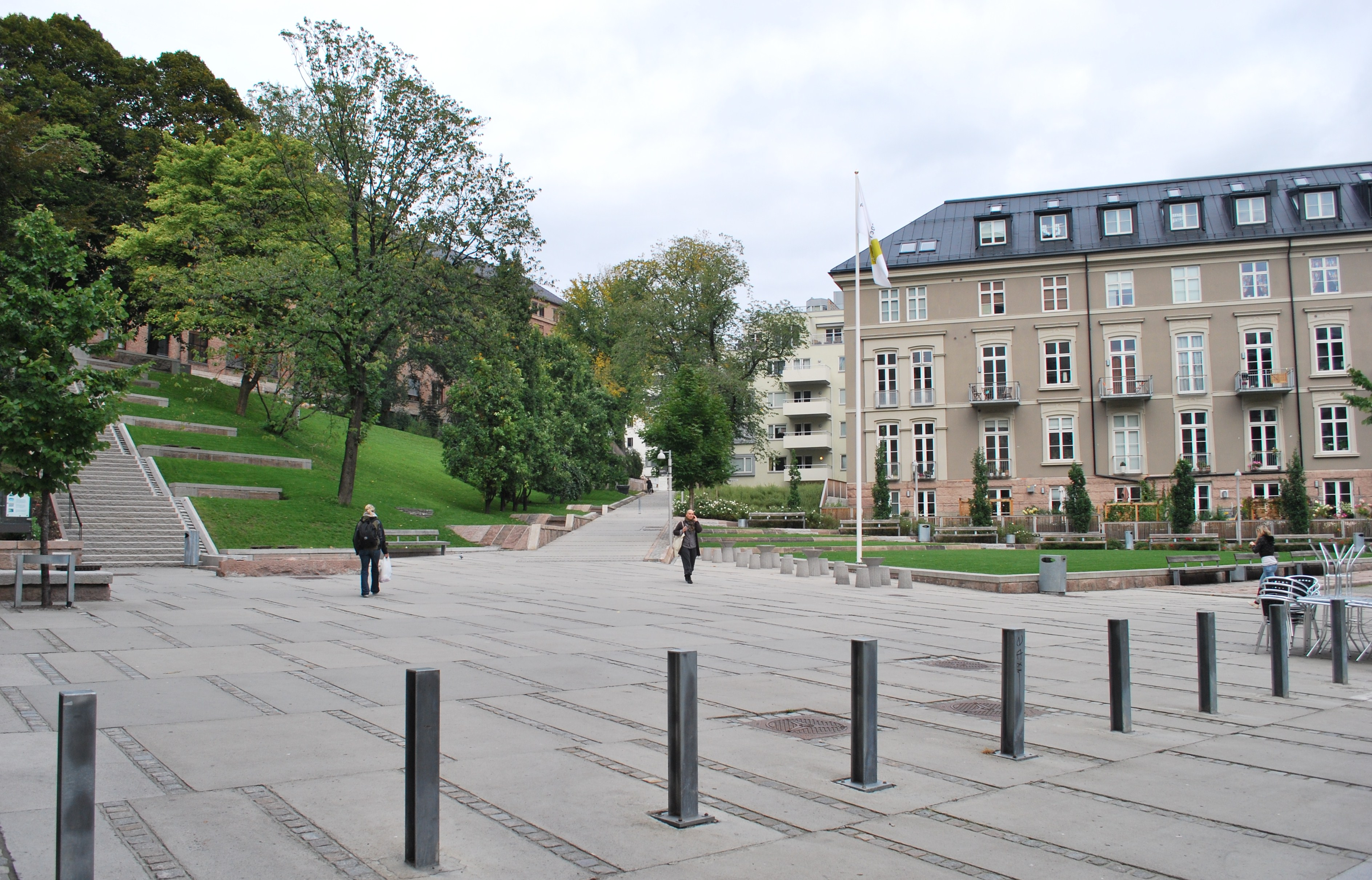 Kvinneklinikkparken og Ballplassen (torget), Pilestredet park, Oslo